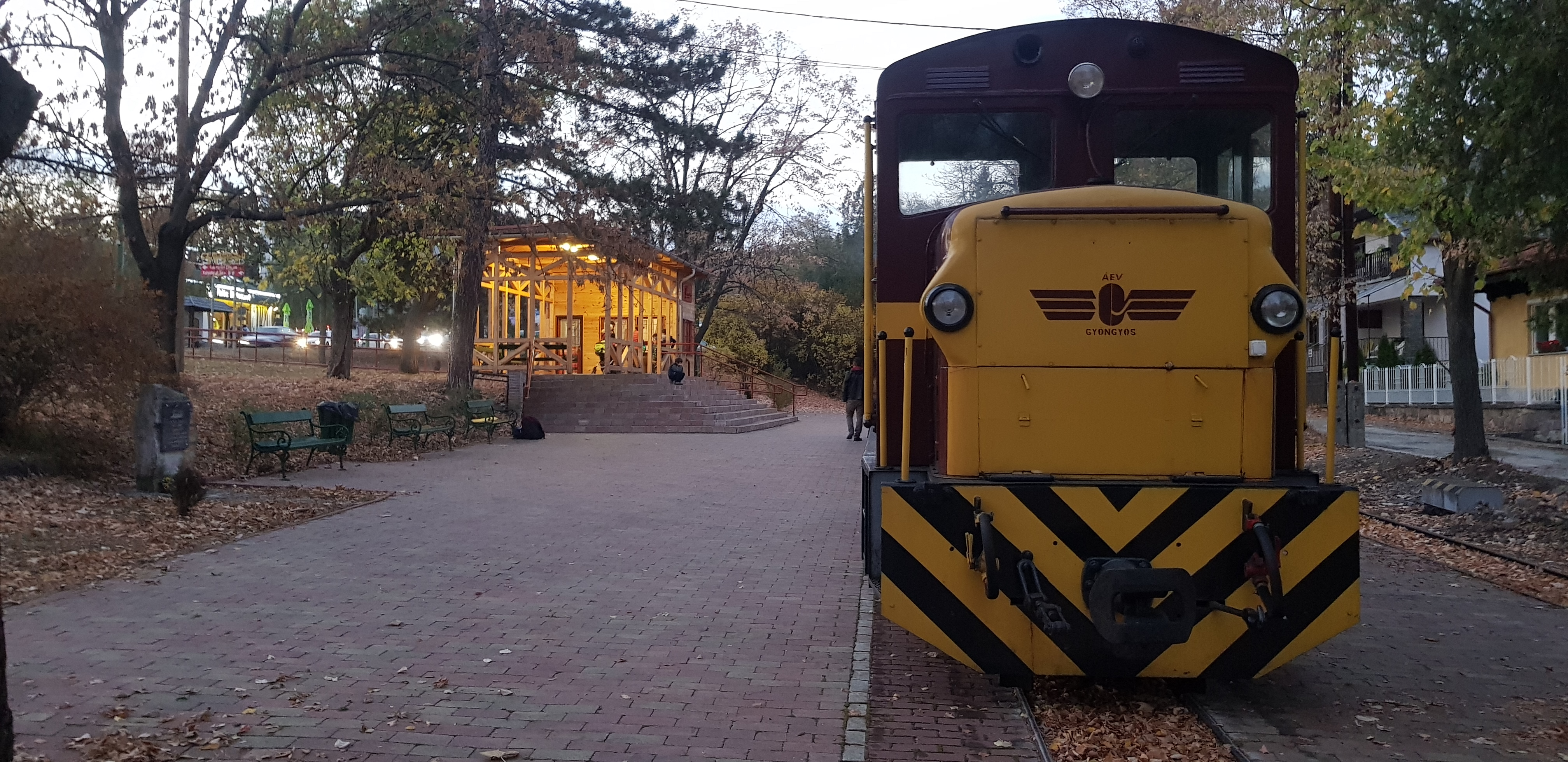 A Mátravasút Mátrafüredi végállomása.